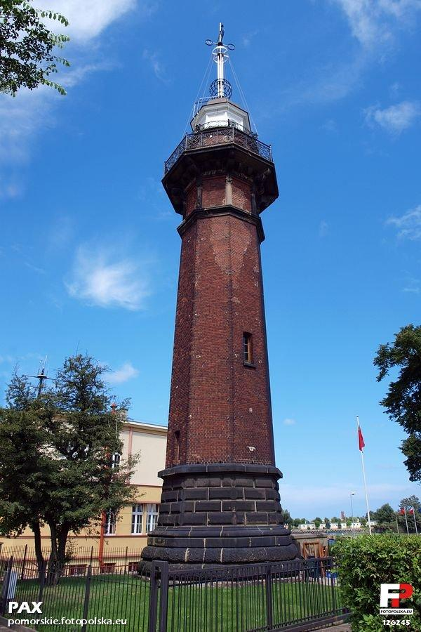 Latarnia morska w Nowym Porcie.